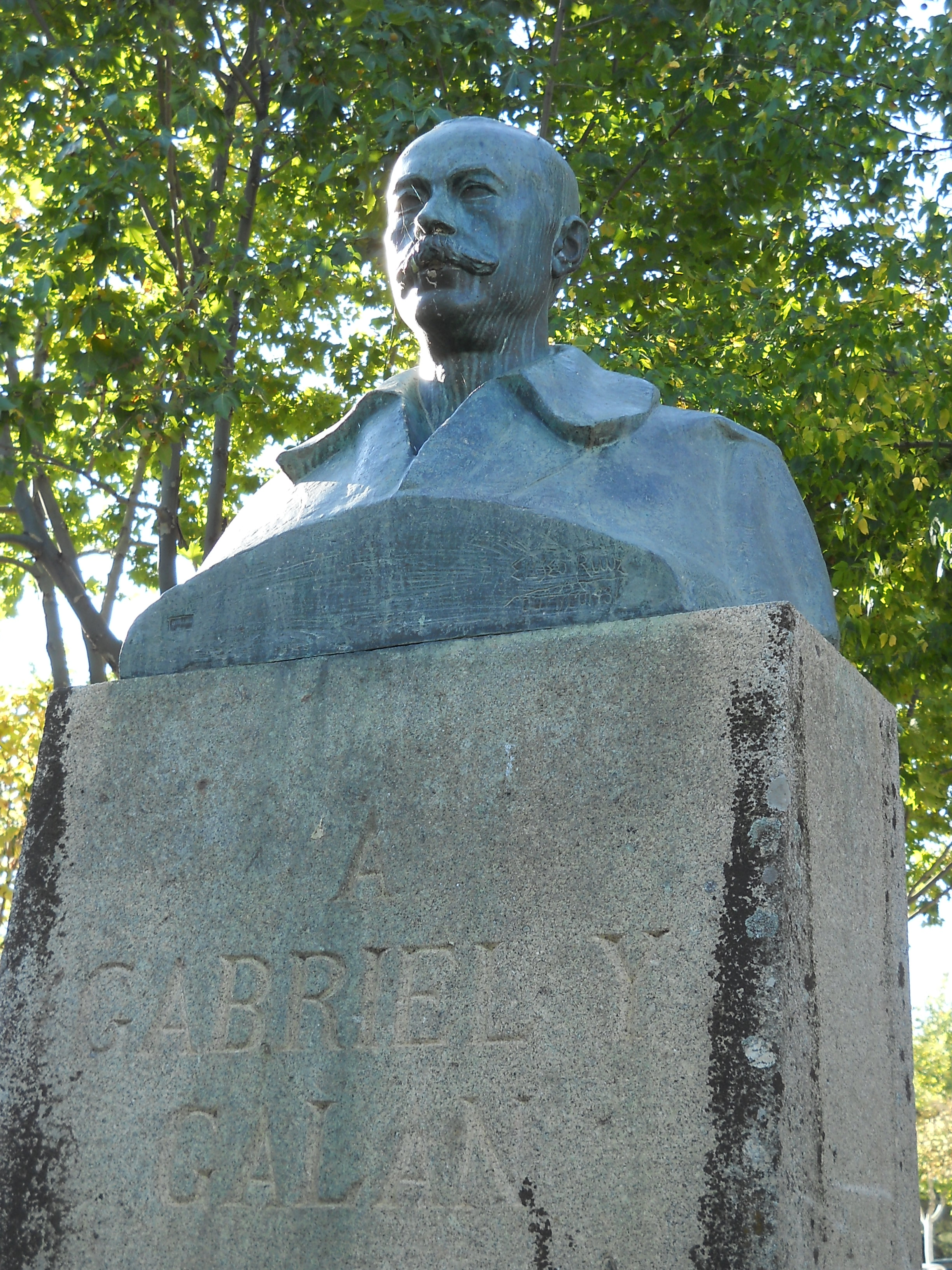 Monumento a José María Gabriel y Galán, Plasencia, Cáceres, España